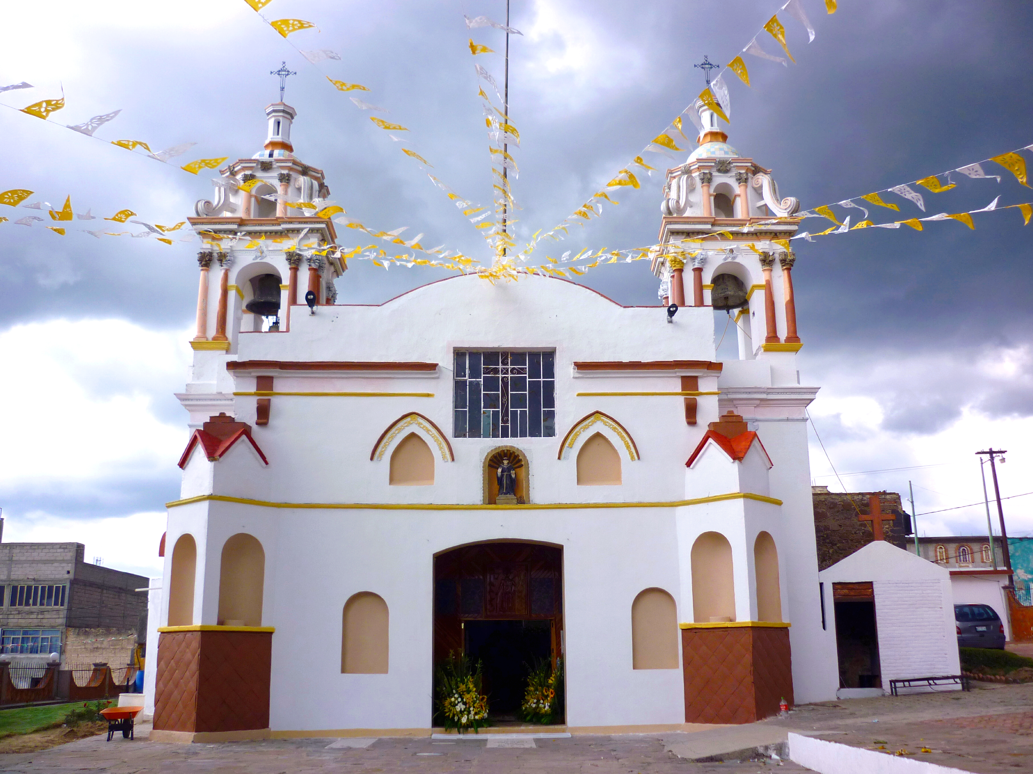 Parroquia de San Nicolás de Tolentino. Terrenate, Tlaxcala